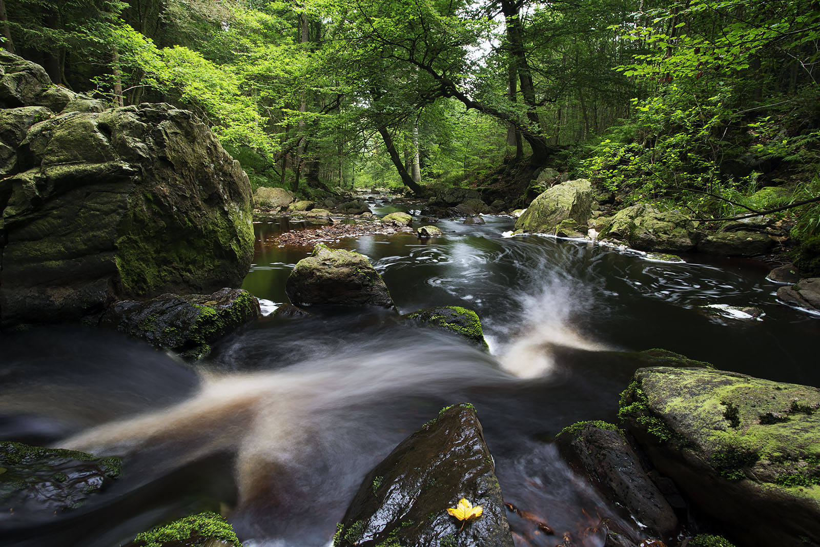 De Ninglinspo is een zijriviertje van de Amblève nabij het Luikse plaatsje Nonceveux bij Remouchamps in de gemeente Aywaille en vormt de benedenloop van de Hornay die nabij het plaatsje Vertbuisson in de gemeente Theux ontspringt.